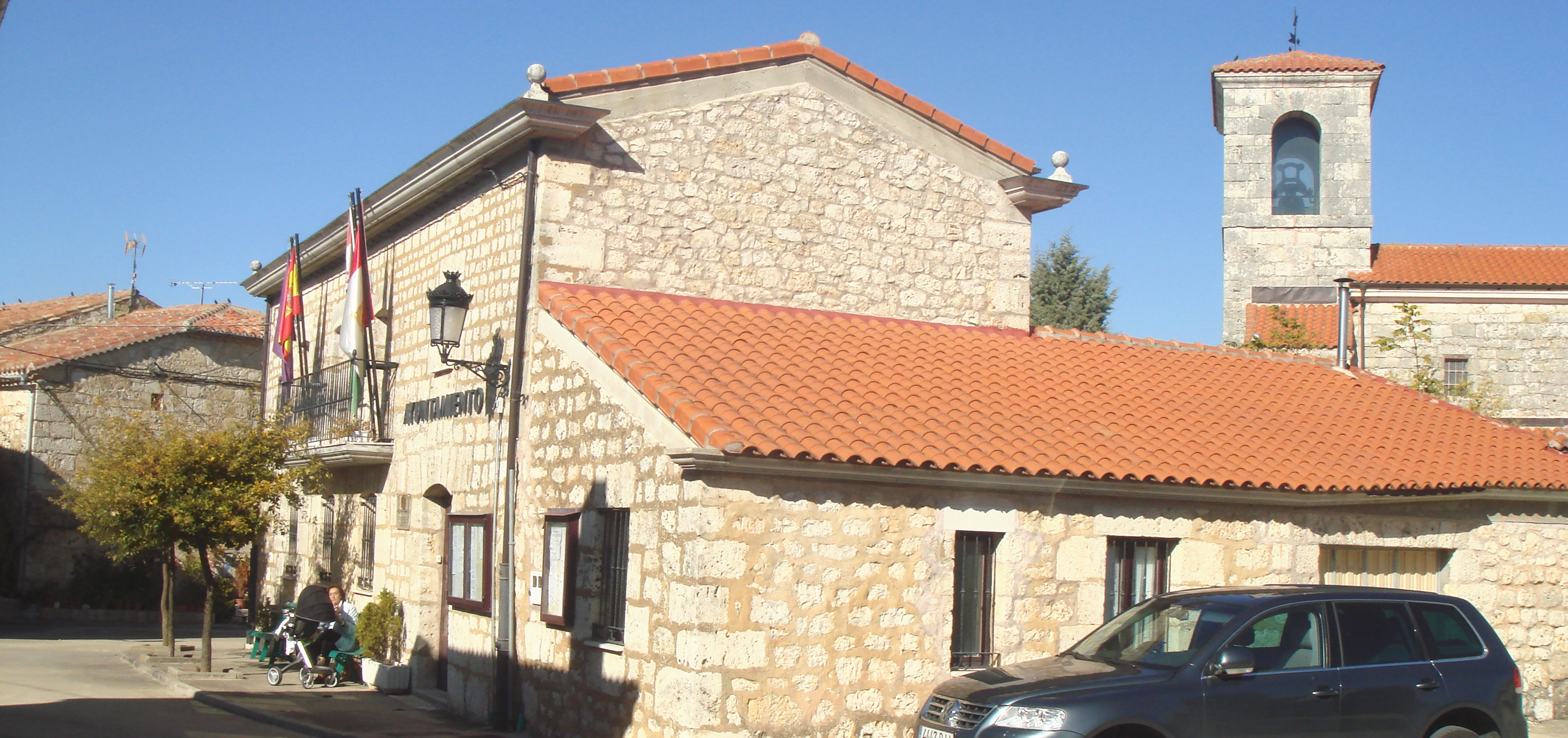 Casas Consistoriales, Carcedo de Burgos, España